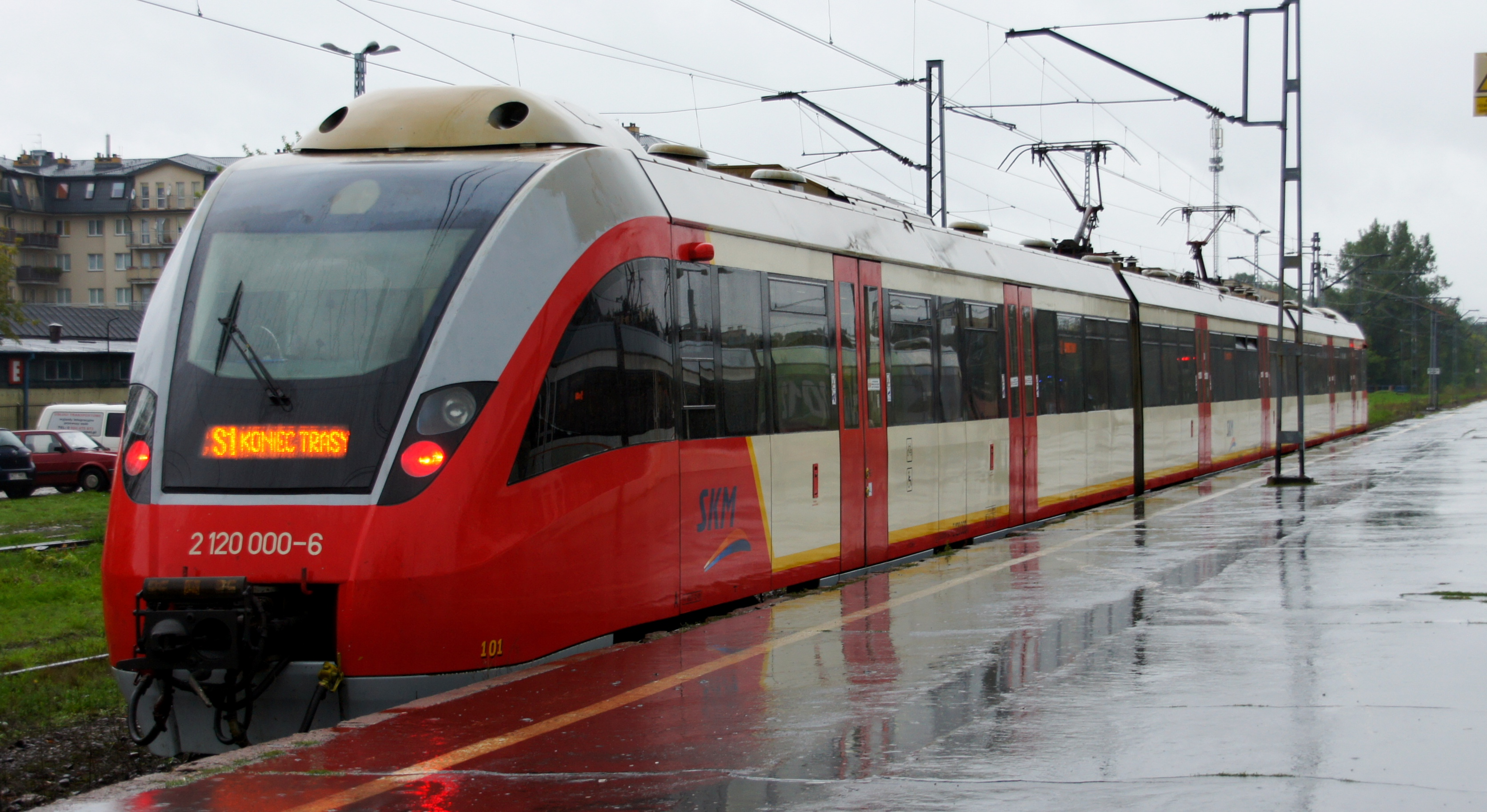 Pociąg SKM Warszawa, typu 14WE, w czasie postoju na stacji PKP Otwock po pierwszym kursie na linii S1